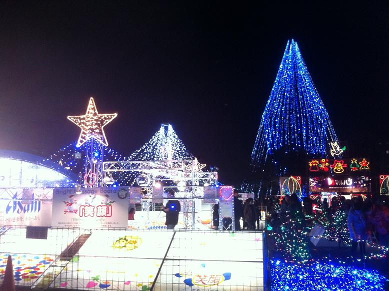 香川県高松市 高松冬のまつり